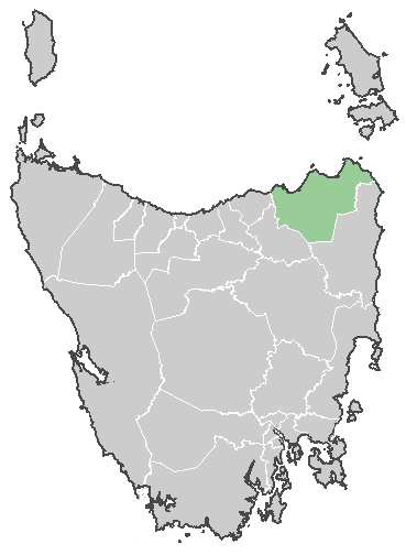 Dorset en Tasmanie Australie (carte)